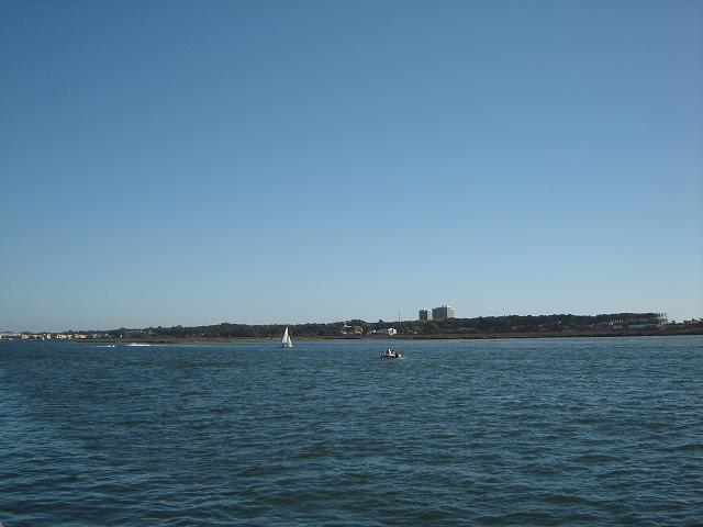 Rio Cávado. Foz do Cávado junto a Esposende.